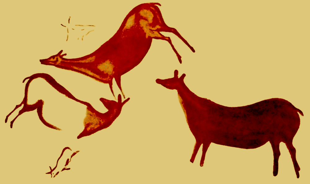 Ciervas pintadas en rojo con tintas planas del panel número 22, de la Galería A (primer santuario) de la Cueva de La Pasiega, en el monte Castillo, localidad de Puente Viesgo (Cantabria, España)